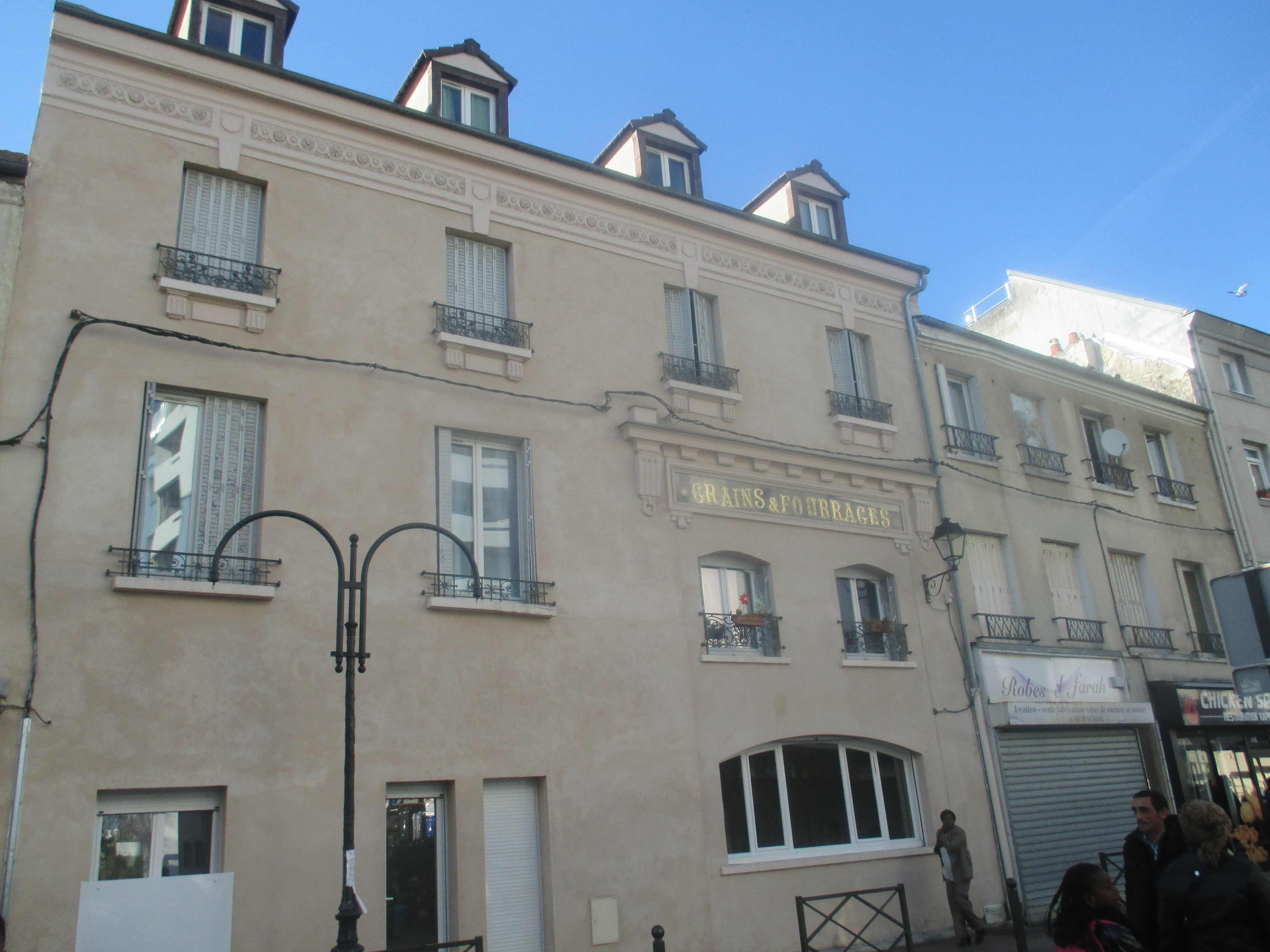 Immeuble de la rue Paul Vaillant-Couturier, dans le centre piétonnier d'Argenteuil.